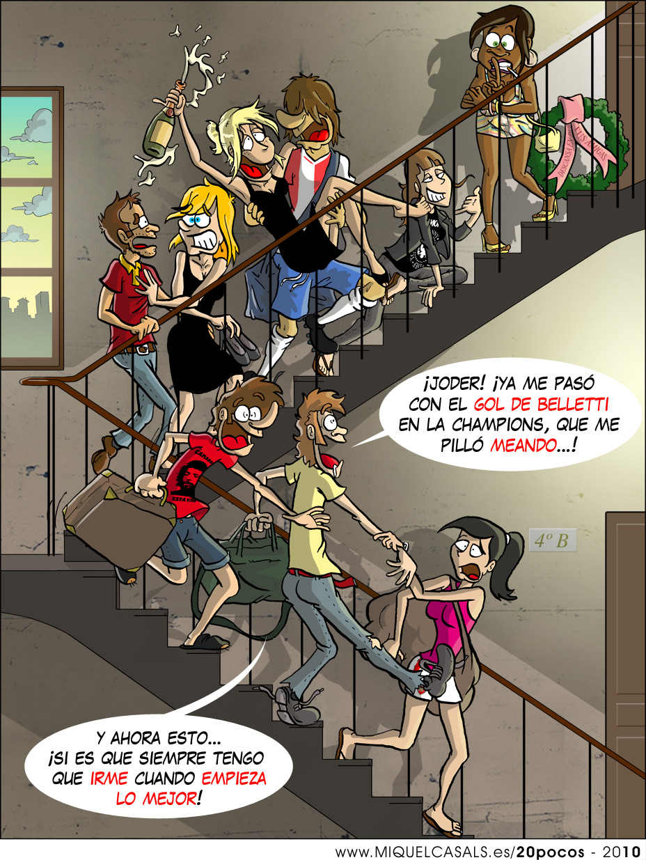 Ilustración conmemorativa del fin de 20pocos y el inicio de Con dos tacones, los dos webcómics de Miquel Casals.